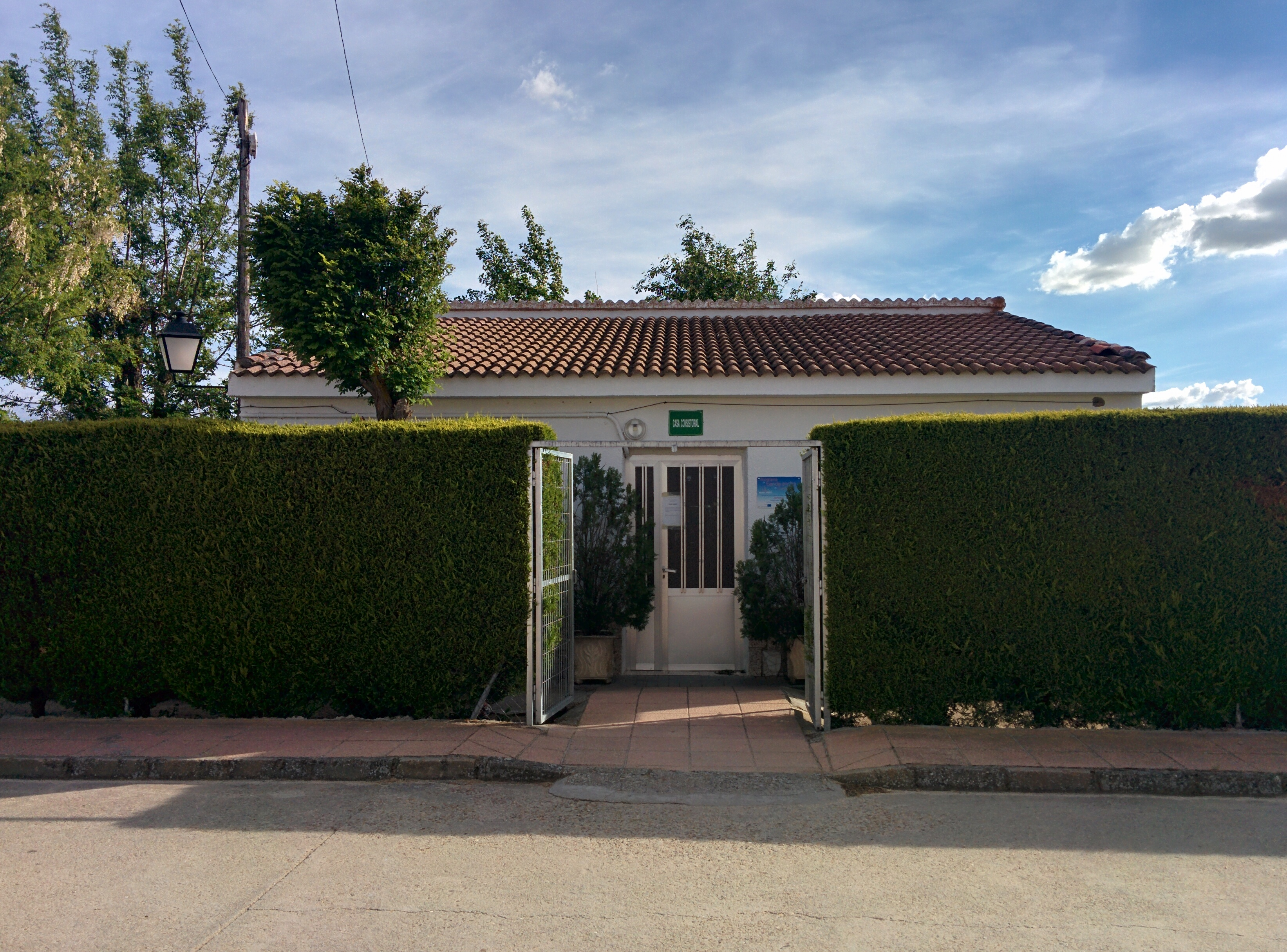 Casa consistorial de Donvidas (Ávila, España).